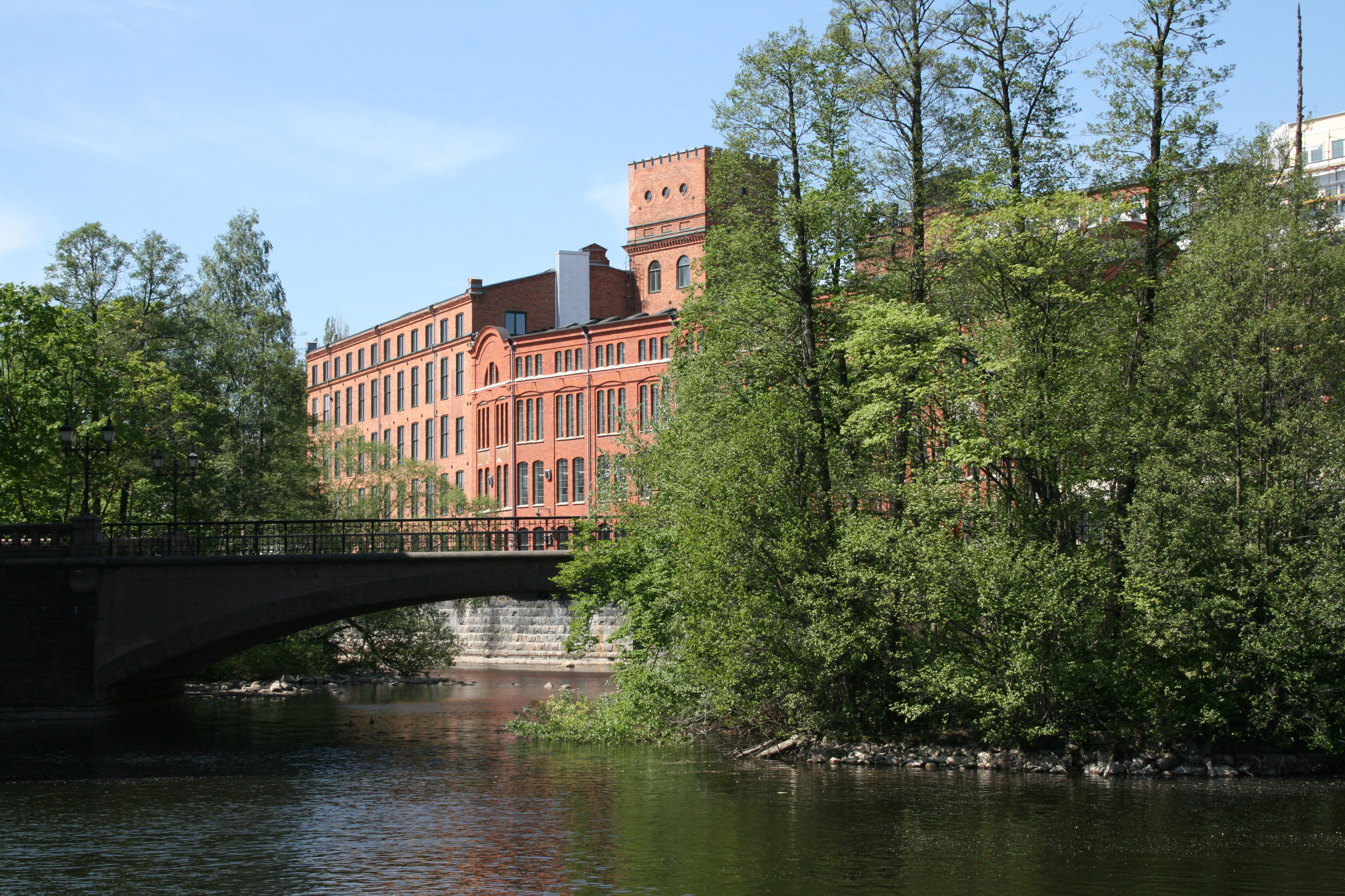 Kåkenhus, Campus Norrköping, Linköpings universitet, Norrköping